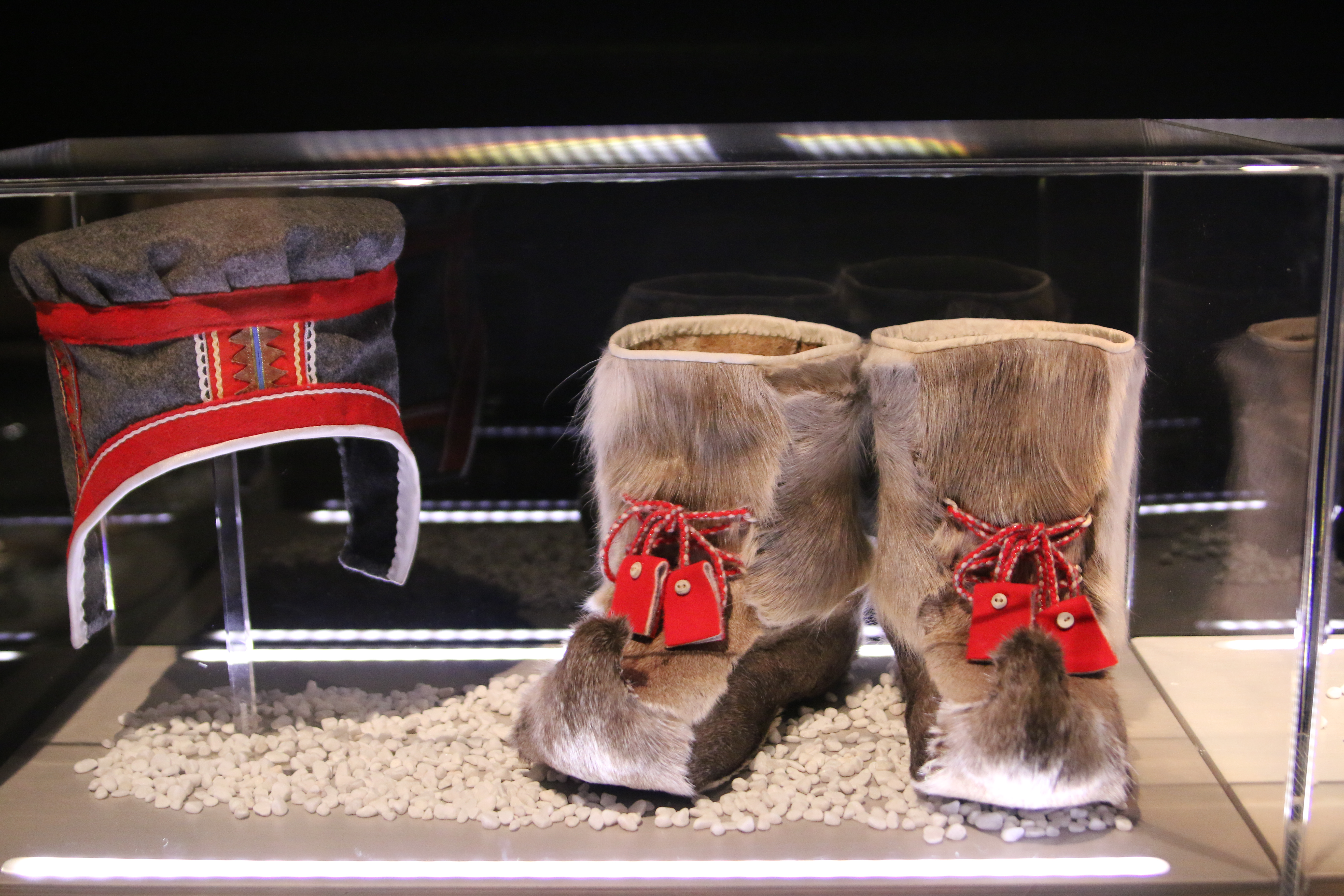 Sverresborg museum svensk duodji sørsamisk [foto John Osvald Grønmo/Tråante 2017]